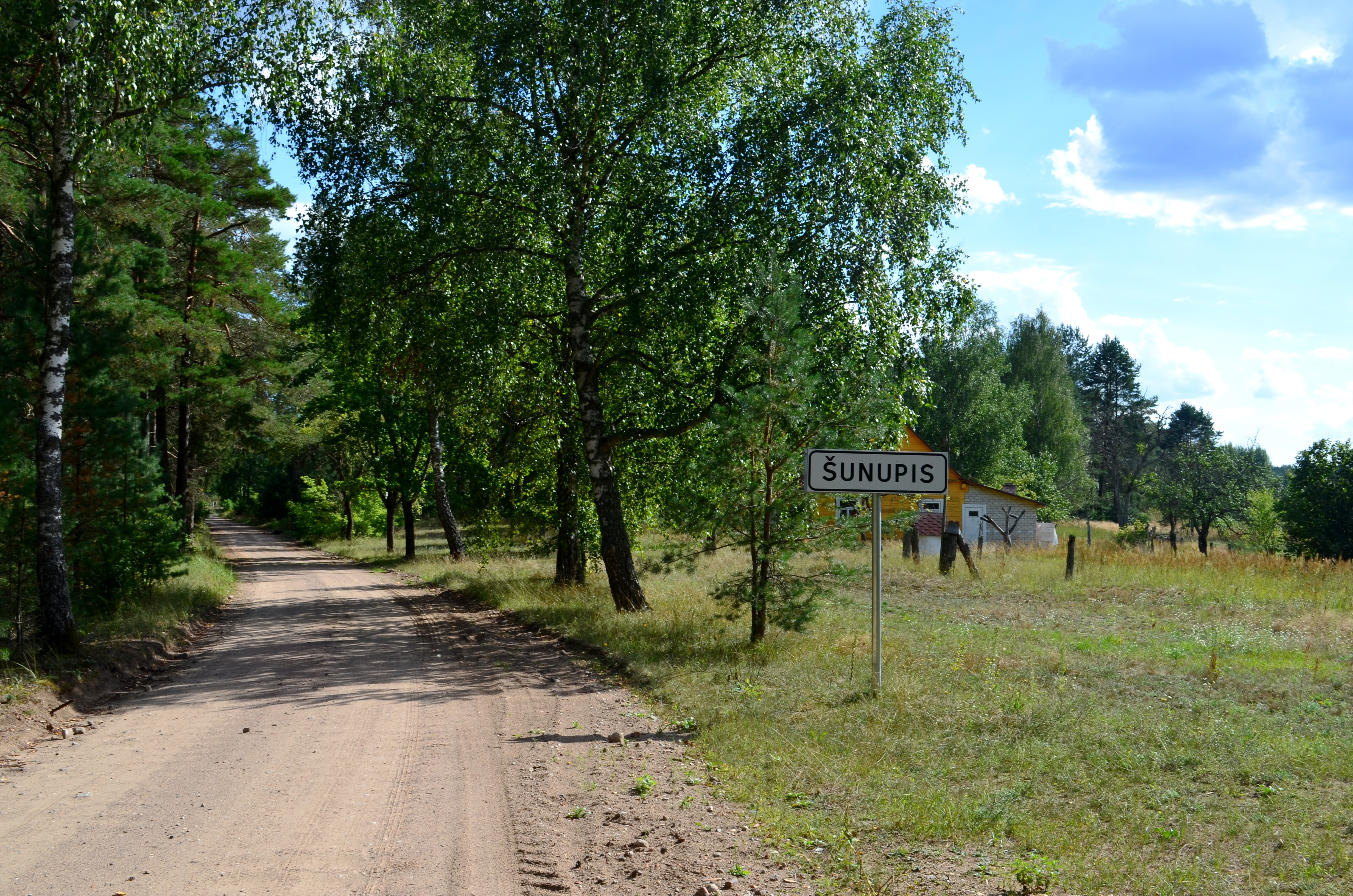 Šunupis, Varėnos raj.